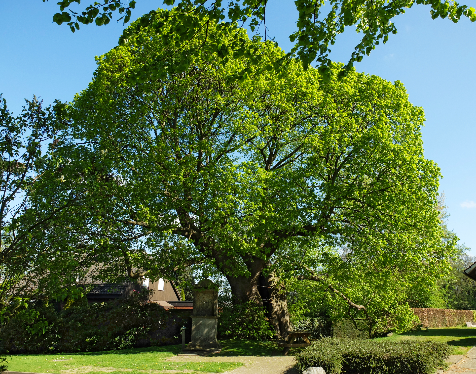 angeblich 1000jährige Linde in Asbeck (Legden, Kreis Borken), Nordrhein-Westfalen, Naturdenkmal, Umfang ca. 10 m